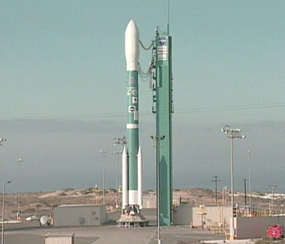 El cohete Delta II con el satelite SAC-C, 21 de noviembre de 2000